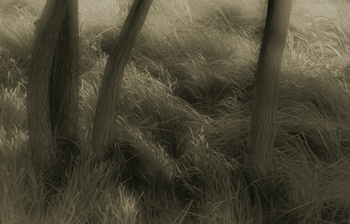 Gelatine silver print. Bromolejová fotografie.